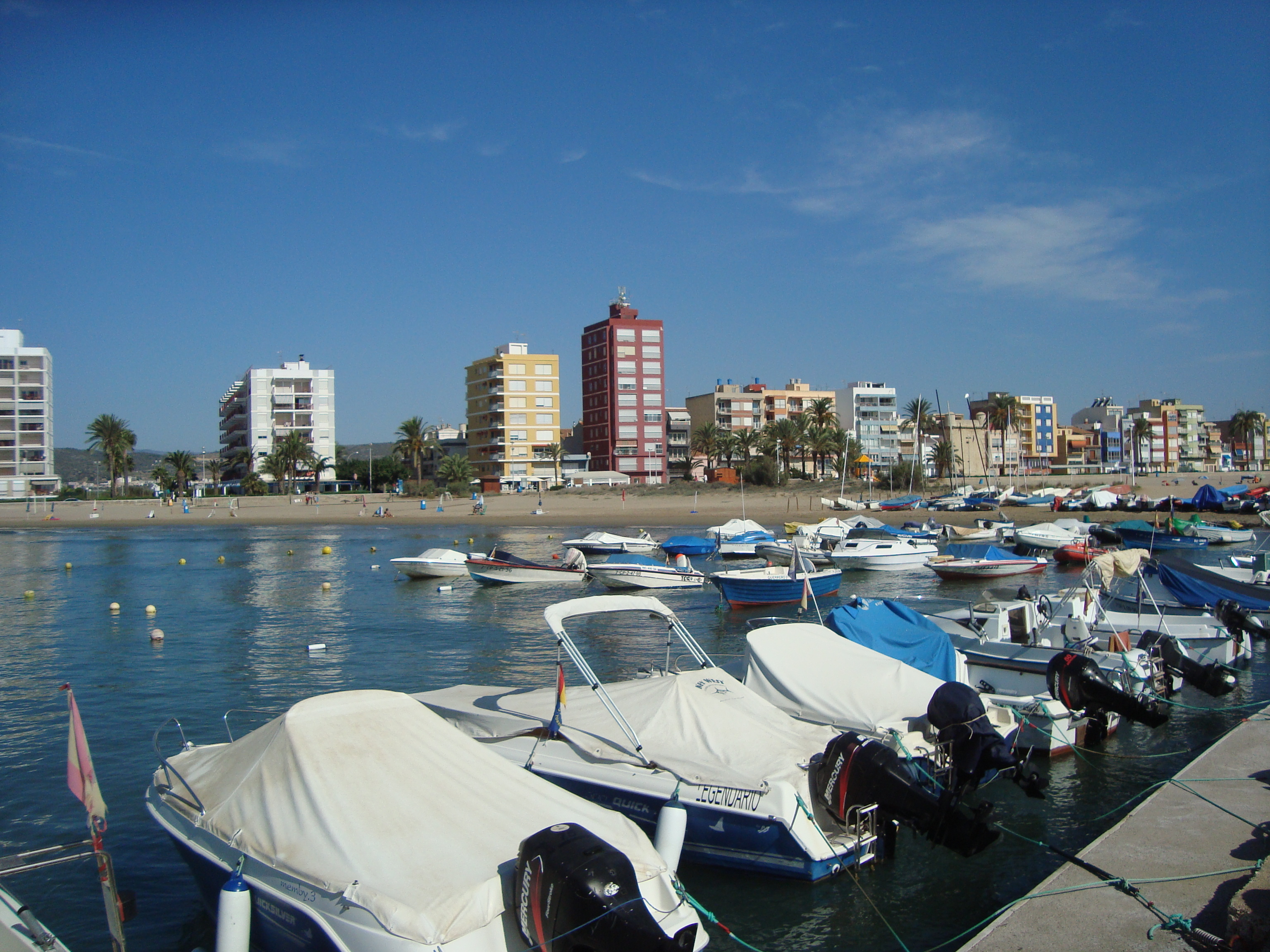 Club Naútic Torrenostra